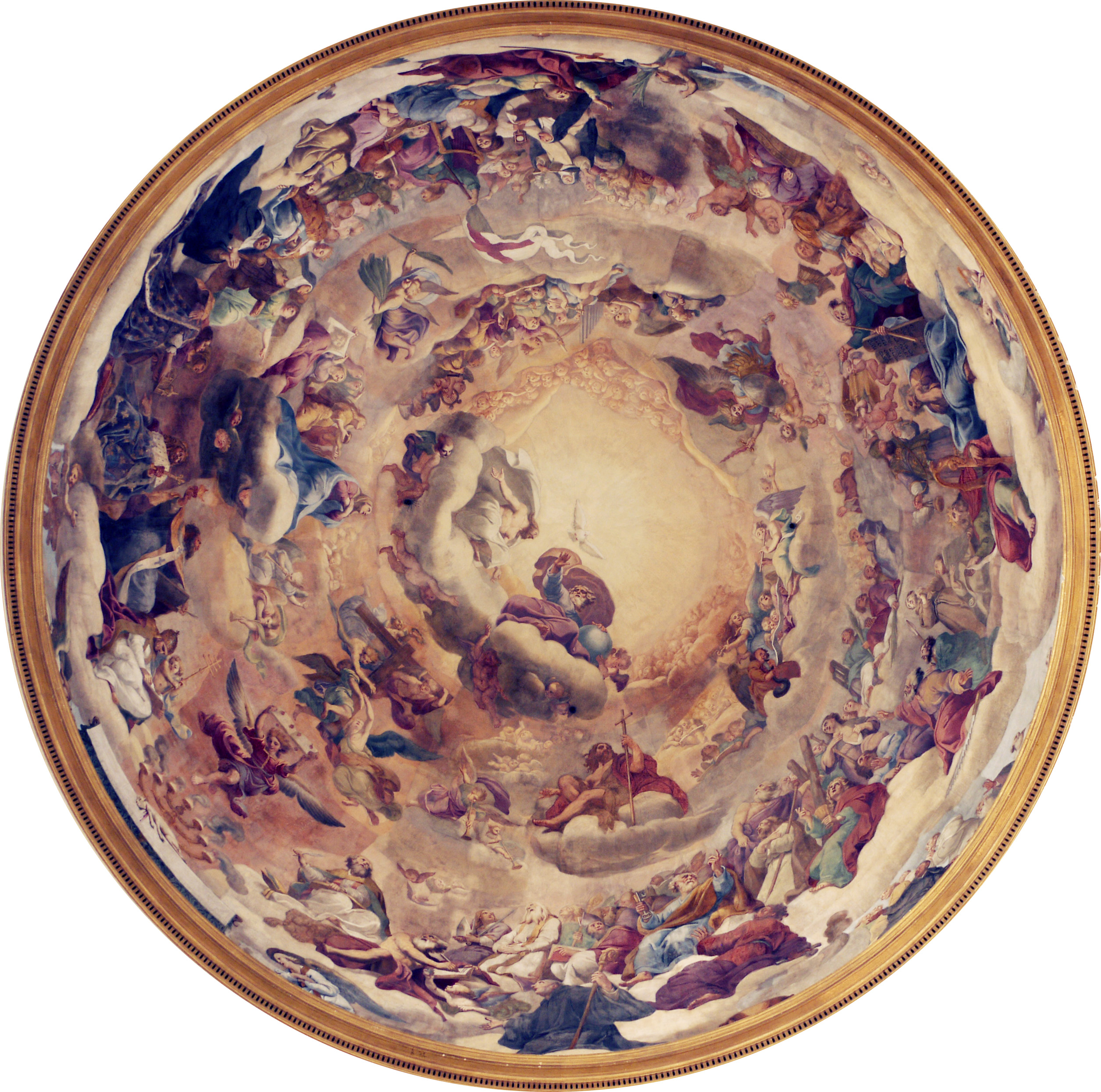 Fresque du dome du Val de Grâce, par Pierre Mignard, 1663.